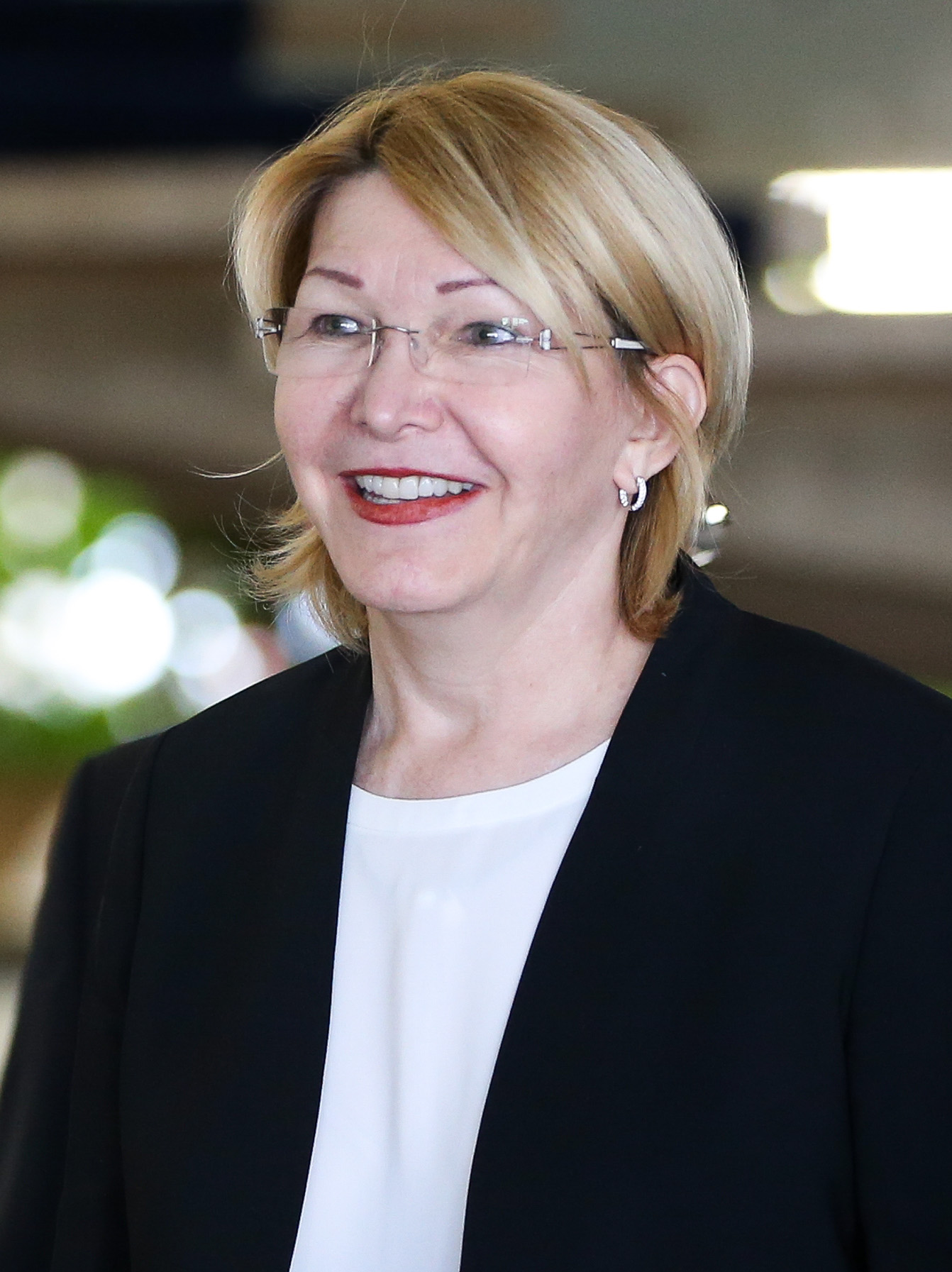 Brasília - A ex-procuradora-geral da Venezuela Luísa Ortega Díaz e o ministro de Relações Exteriores, Aloysio Nunes, falam à imprensa no Palácio Itamaraty. Luísa foi destituída do cargo pelo governo de Nicolás Maduro (Marcelo Camargo/Agência Brasil)